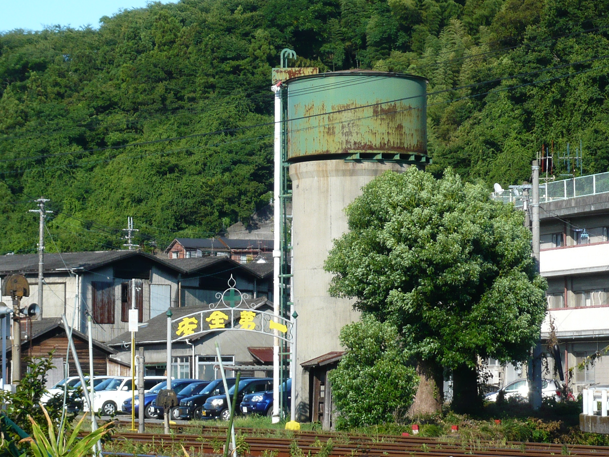 旧宇和島機関区給水塔